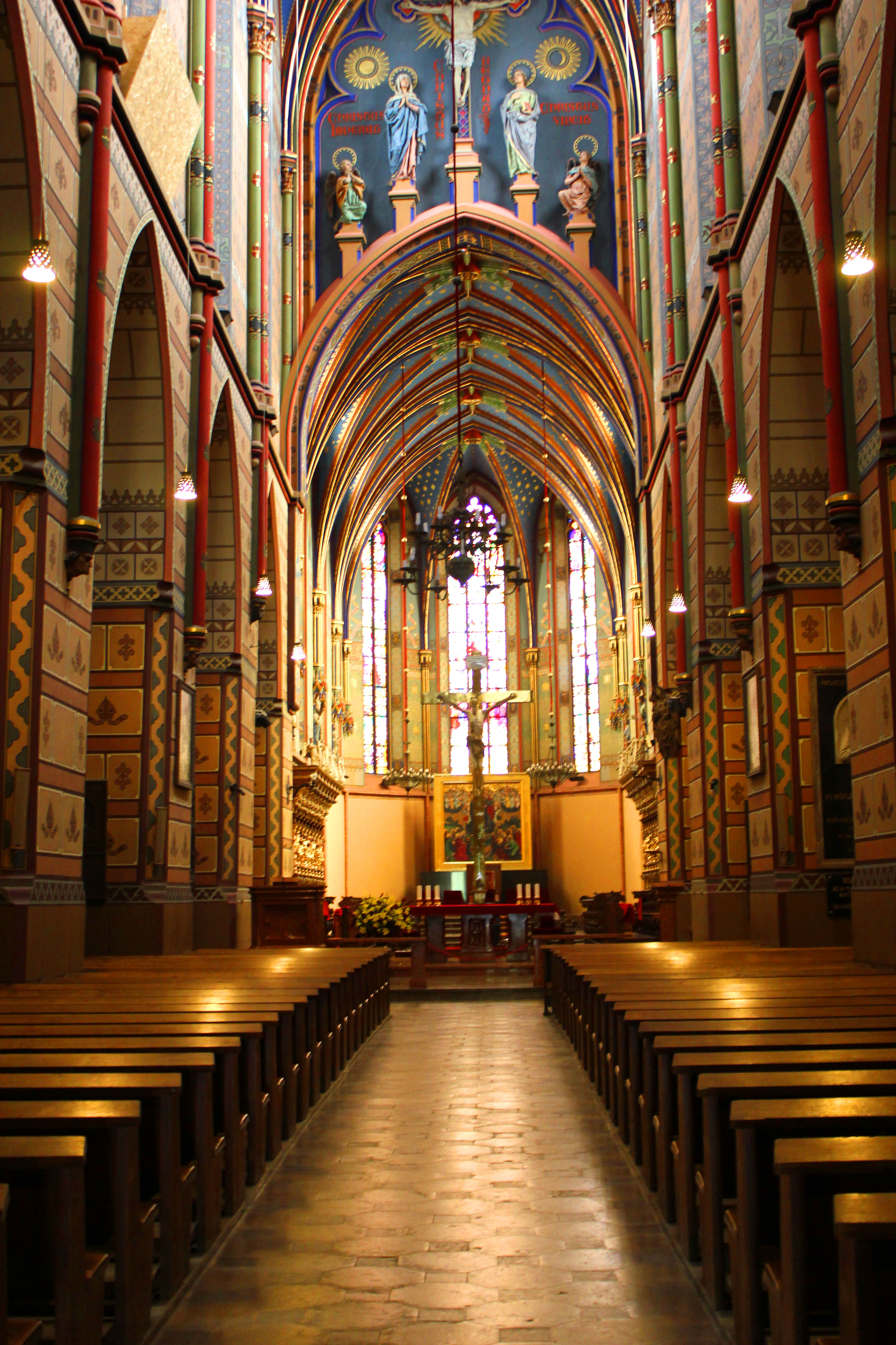 katedra p.w. Wniebowzięcia NMP, XIV/XV, XVI-XVII, 1891 Włocławek, ul. Gdańska 3, miasto Włocławek